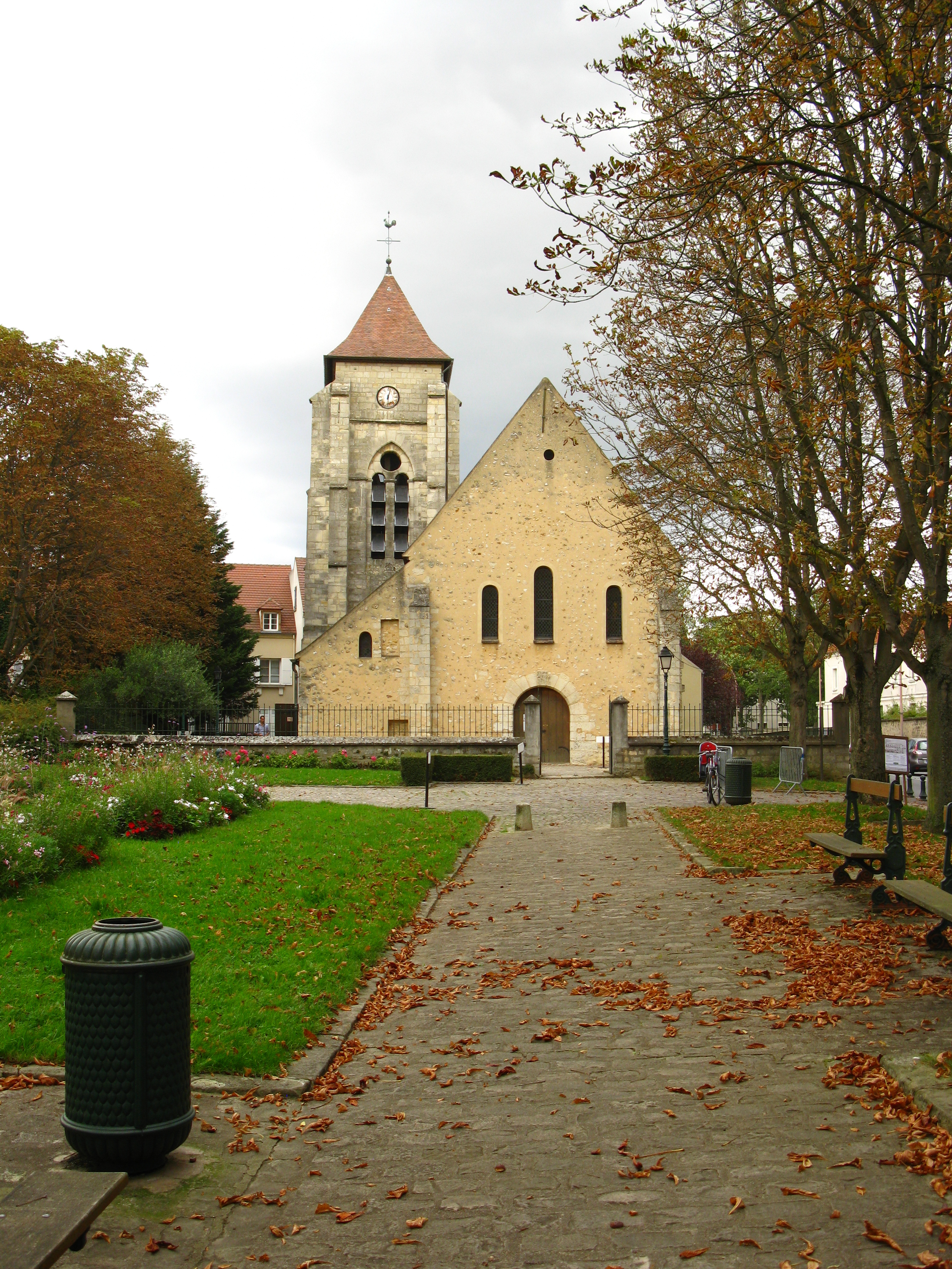 Vue extérieure de l'église Sainte-Colombe de Chevilly-Larue .